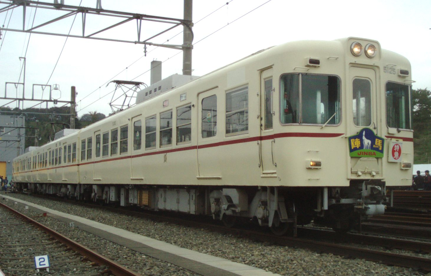 京王5000系電車